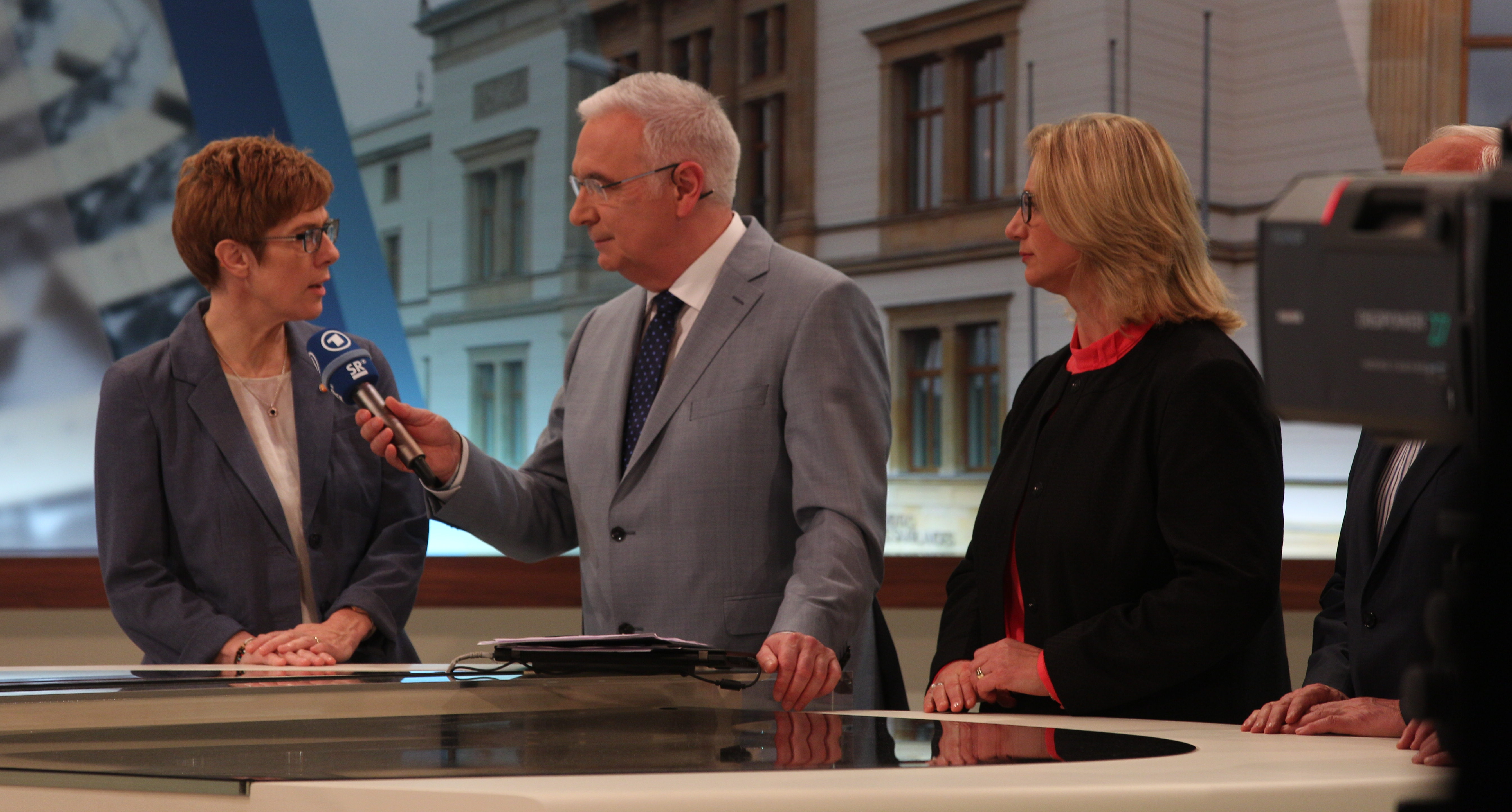 Blick ins ARD-Wahlstudio während des Interviews für die tagesschau beim Wahlabend zur Landtagswahl im Saarland